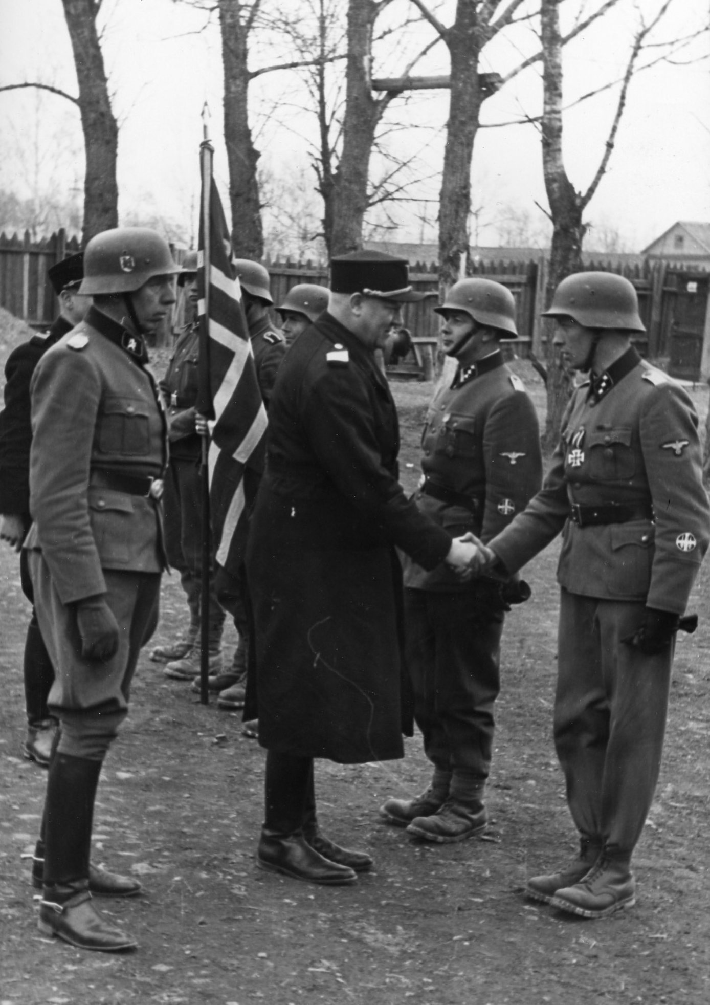 Vor Leningrad. Mai 1942. Vidkun Quisling bei den norweg. Freiwilligen. Norwegens Ministerpräsident beglückwünscht einen ZZ- Ustf., der sich als Freiwilliger mit seinem norwegischen Kameraden im Einsatz vor Leningrad besonders hervortrat und mit dem (NK?) ausgezeichnet wurde. 1942/05. RA/S-1256 /U 1/1-4 (img407)